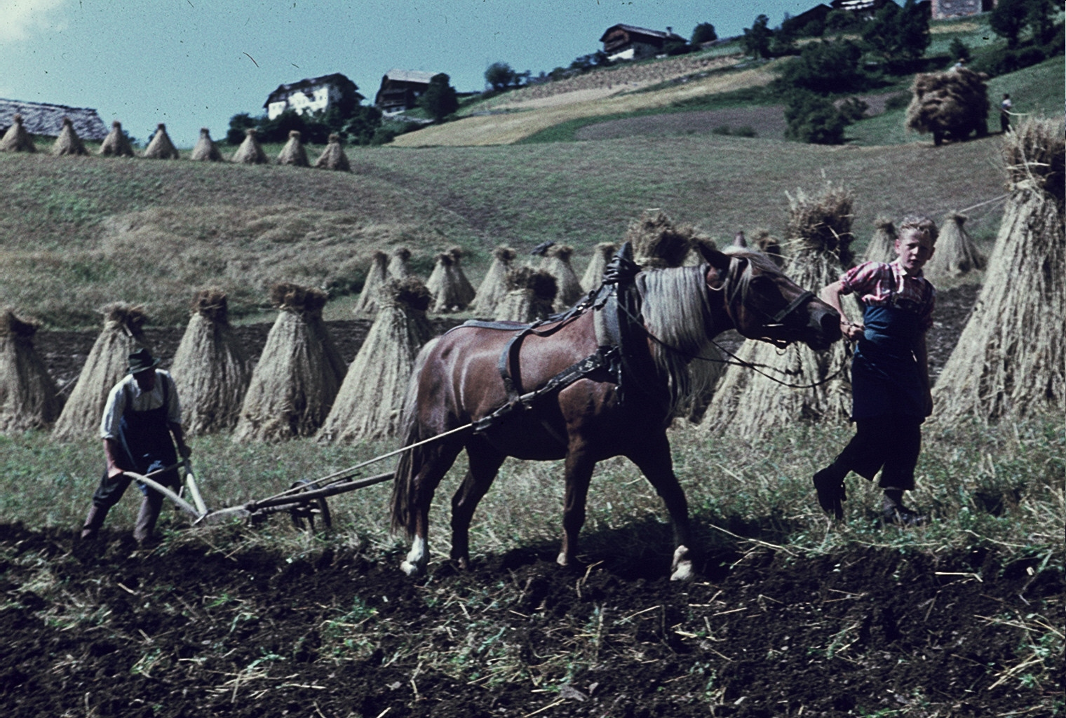 Ploughing in La Val - Wengen - La Valle